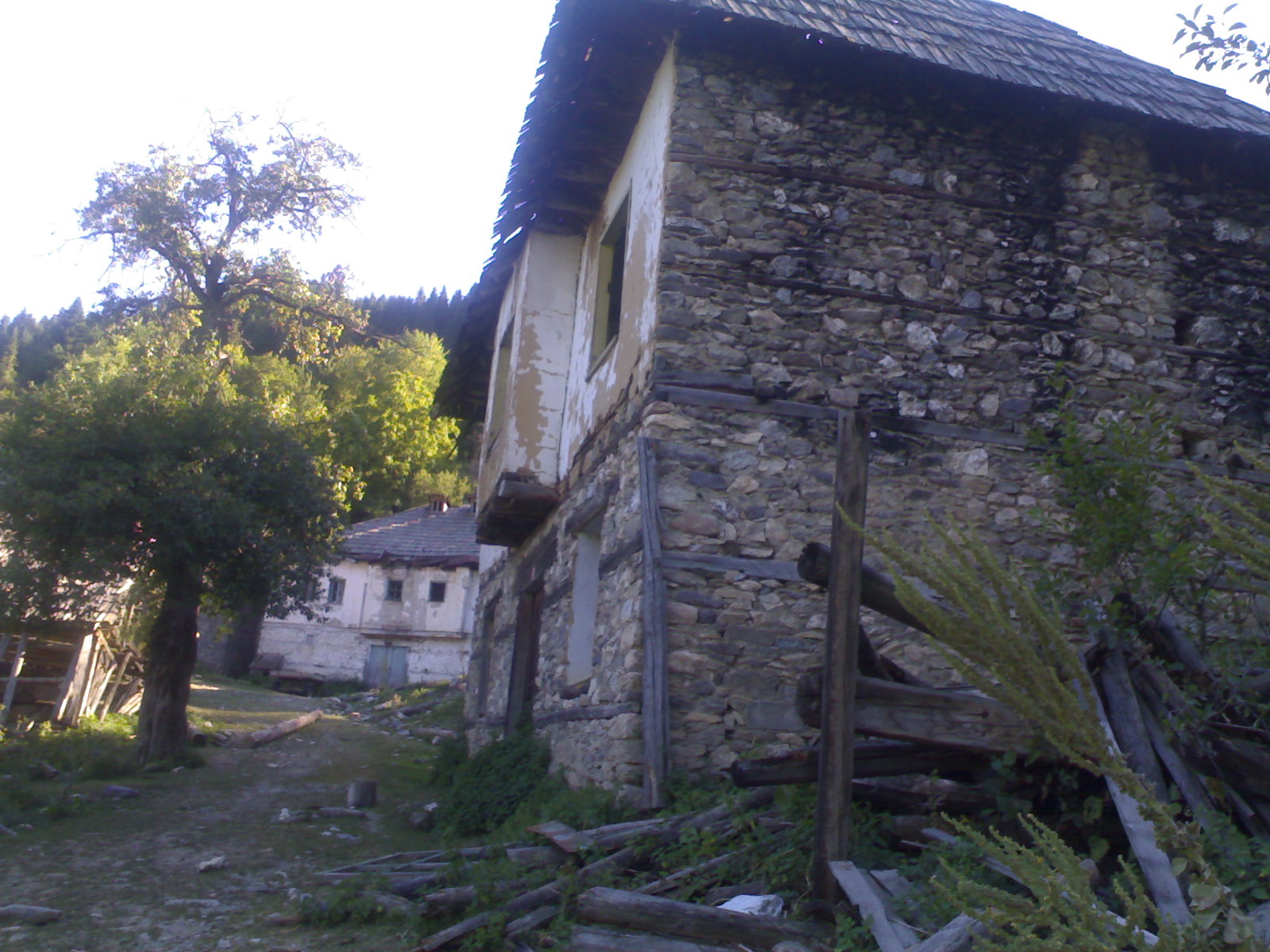 Bibaj, Macedonia